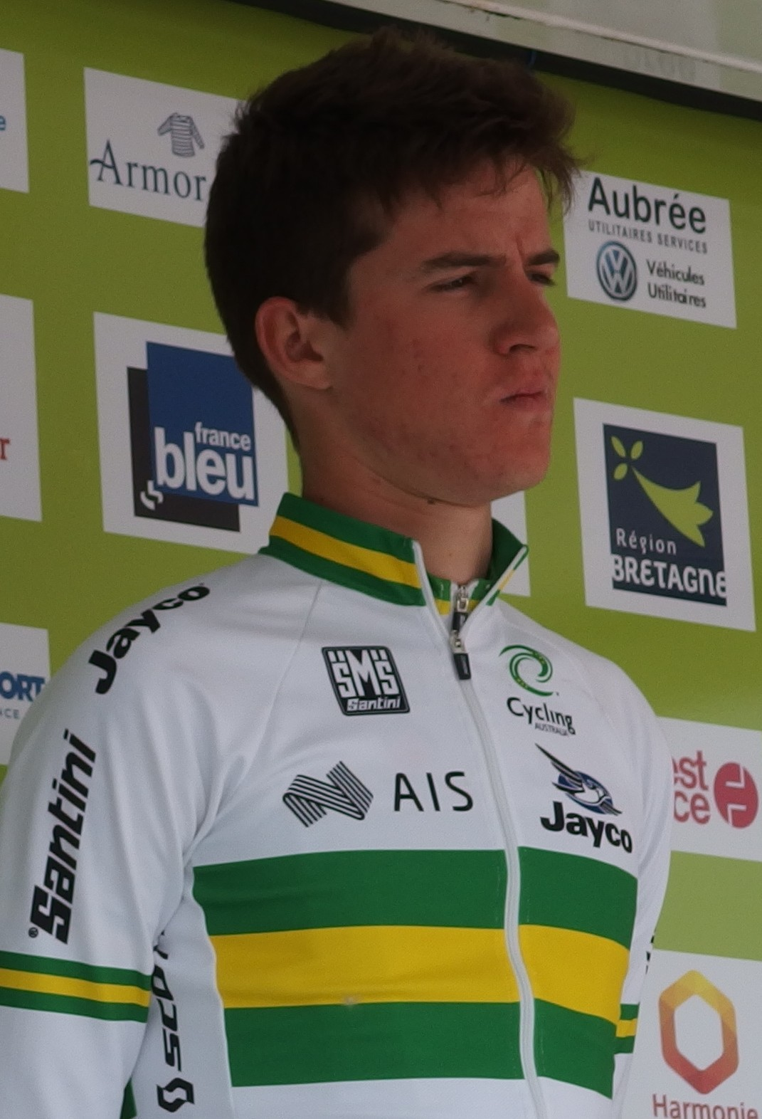 Tour de Bretagne 2014 - Présentation des équipes au départ de la sixième étape à Radenac - Équipe nationale d'Australie Depicted person: Miles Scotson